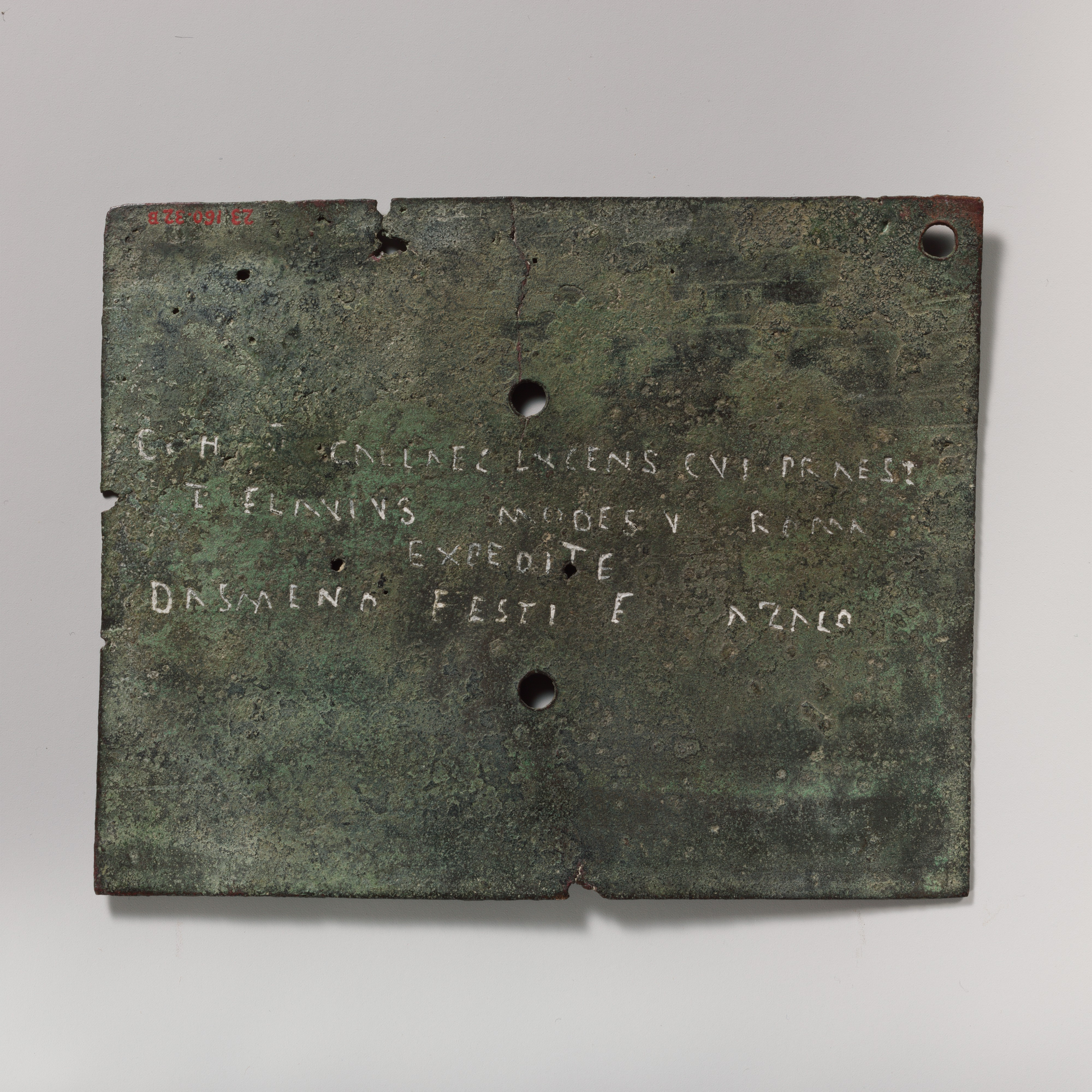 Roman; Military diploma; Bronzes